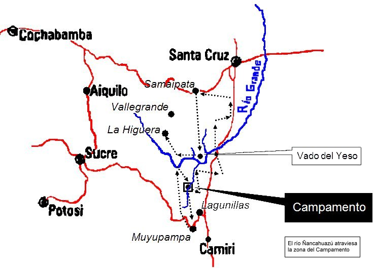 Ruta del Che Guevara en Bolivia, 1967. La línea punteada marca el camino seguido por el grupo guerrillero dirigido por Guevara.